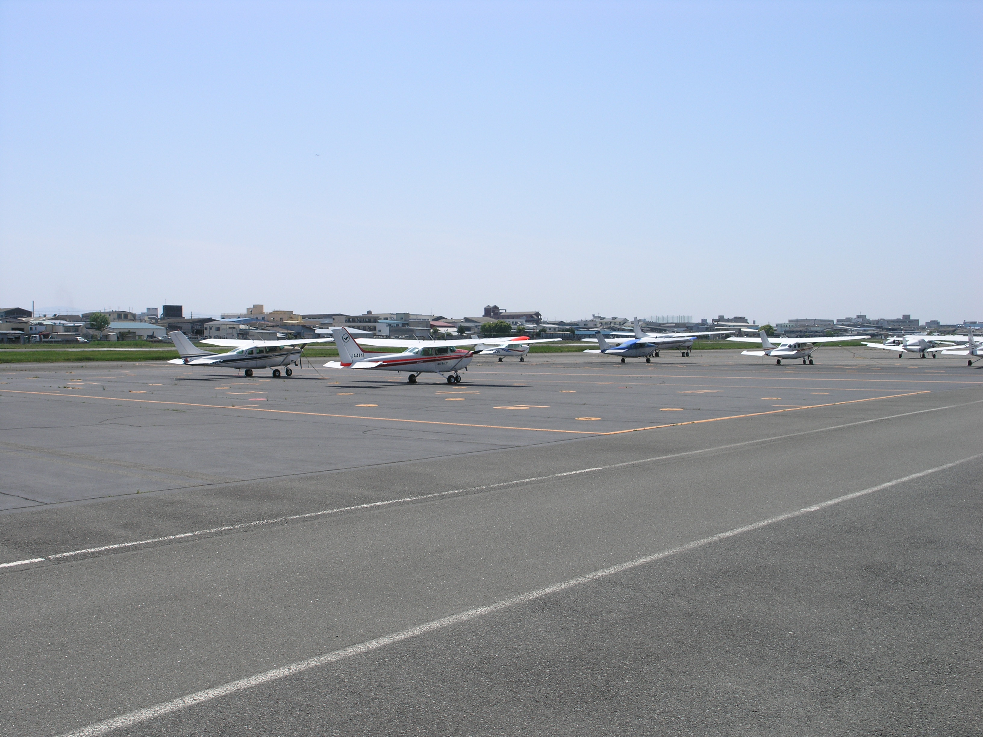 Yao Airport, Osaka, Japan